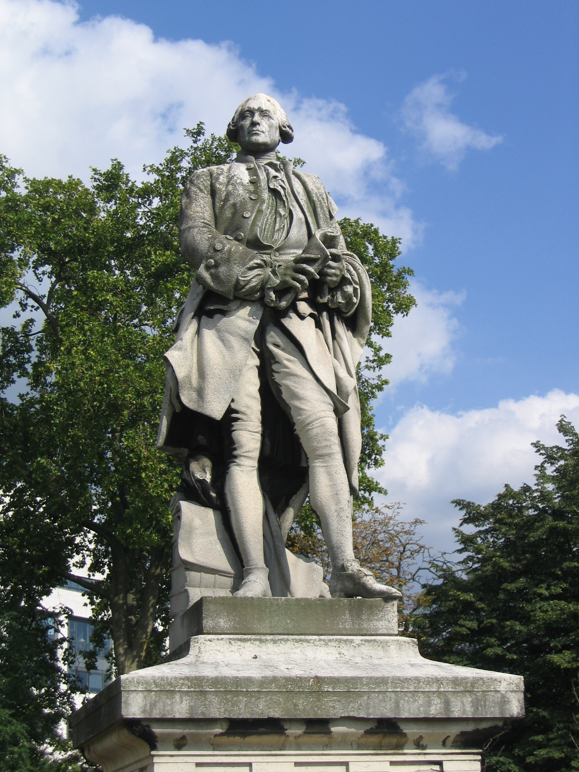 Statue de Claude Bourgelat fondateur des écoles vétérinaires sans le socle angle 2